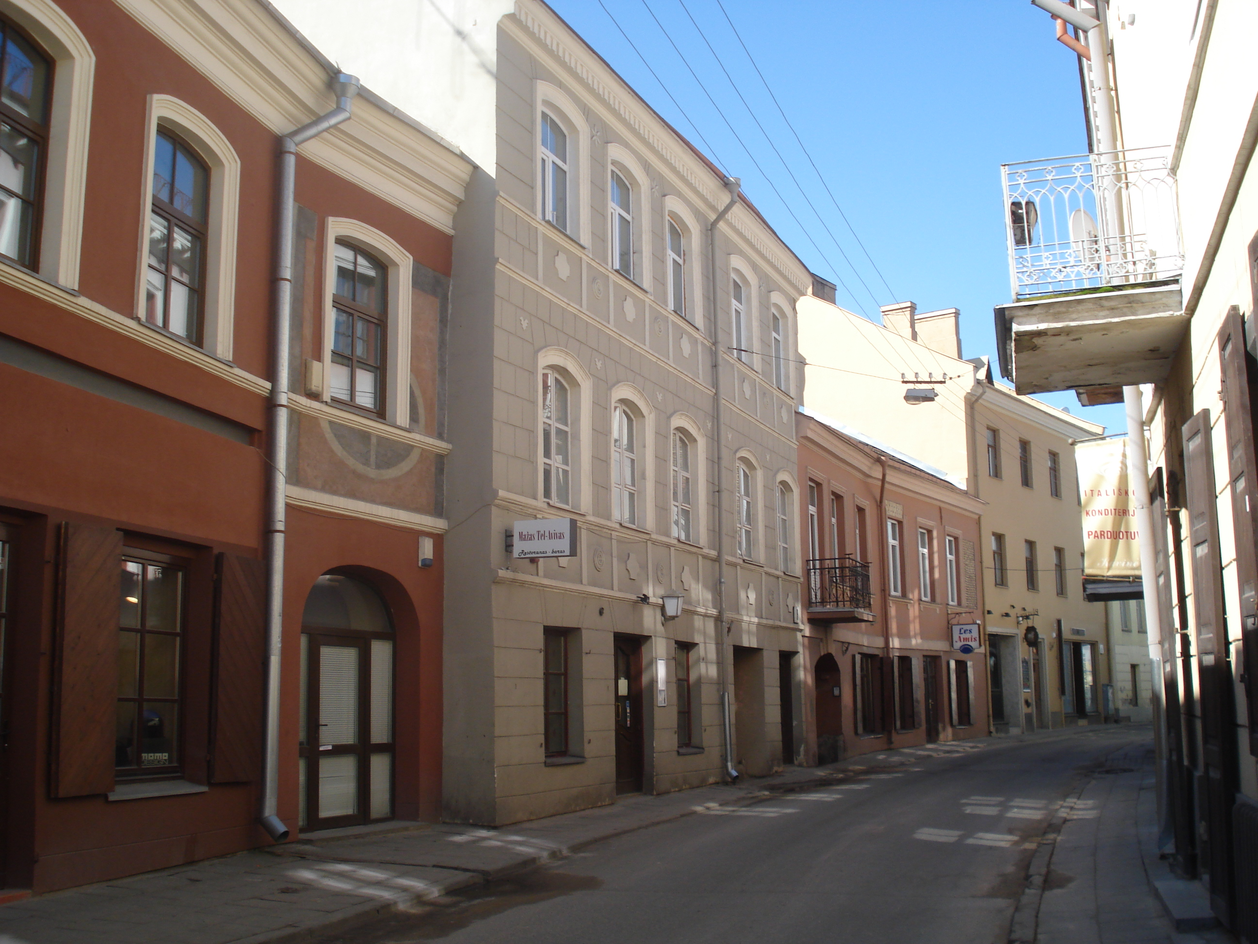 Savičiaus gatvė (ulica Sawicz) in Vilnius